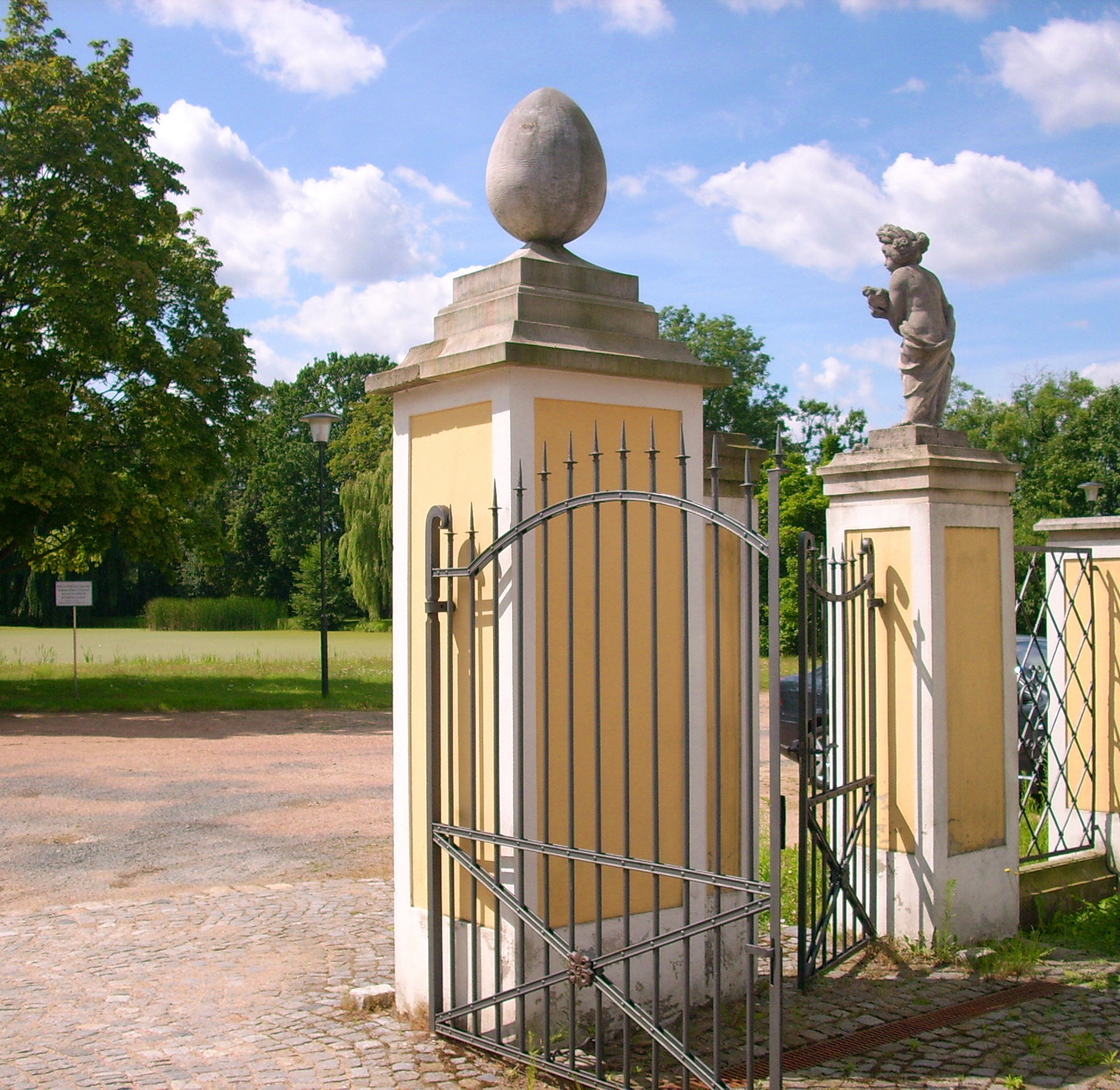 Torpfeiler des Schloss Königswartha